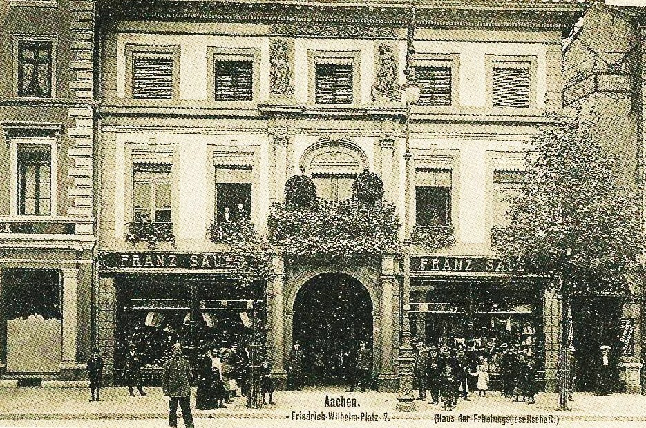 ehemaliges Haus der Erholungsgesellschaft Friedrich-Wilhelm-Platz 7 in Aachen, zugeschrieben Jakob Couven